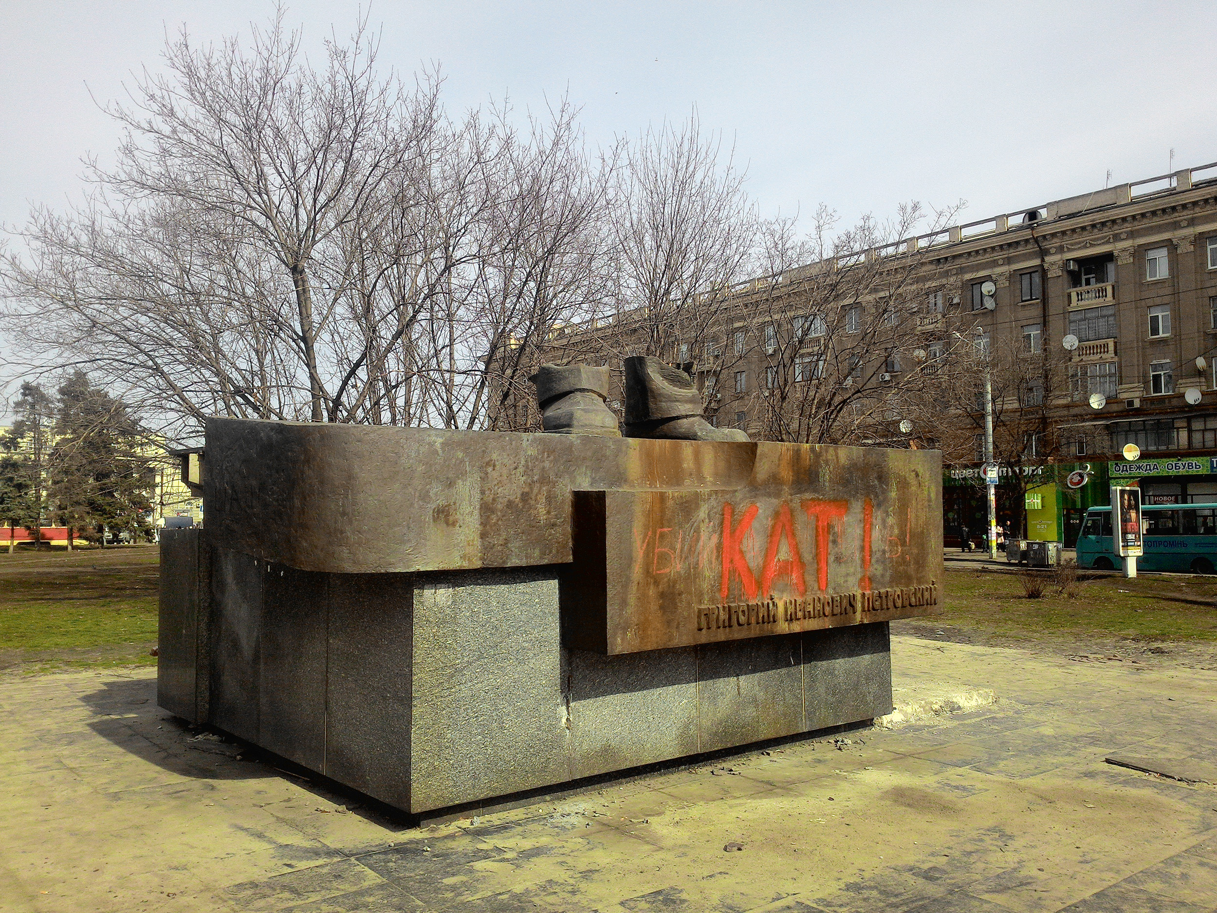 Постамент, що лишився після демонтажу пам'ятника Петровському у Дніпропетровську